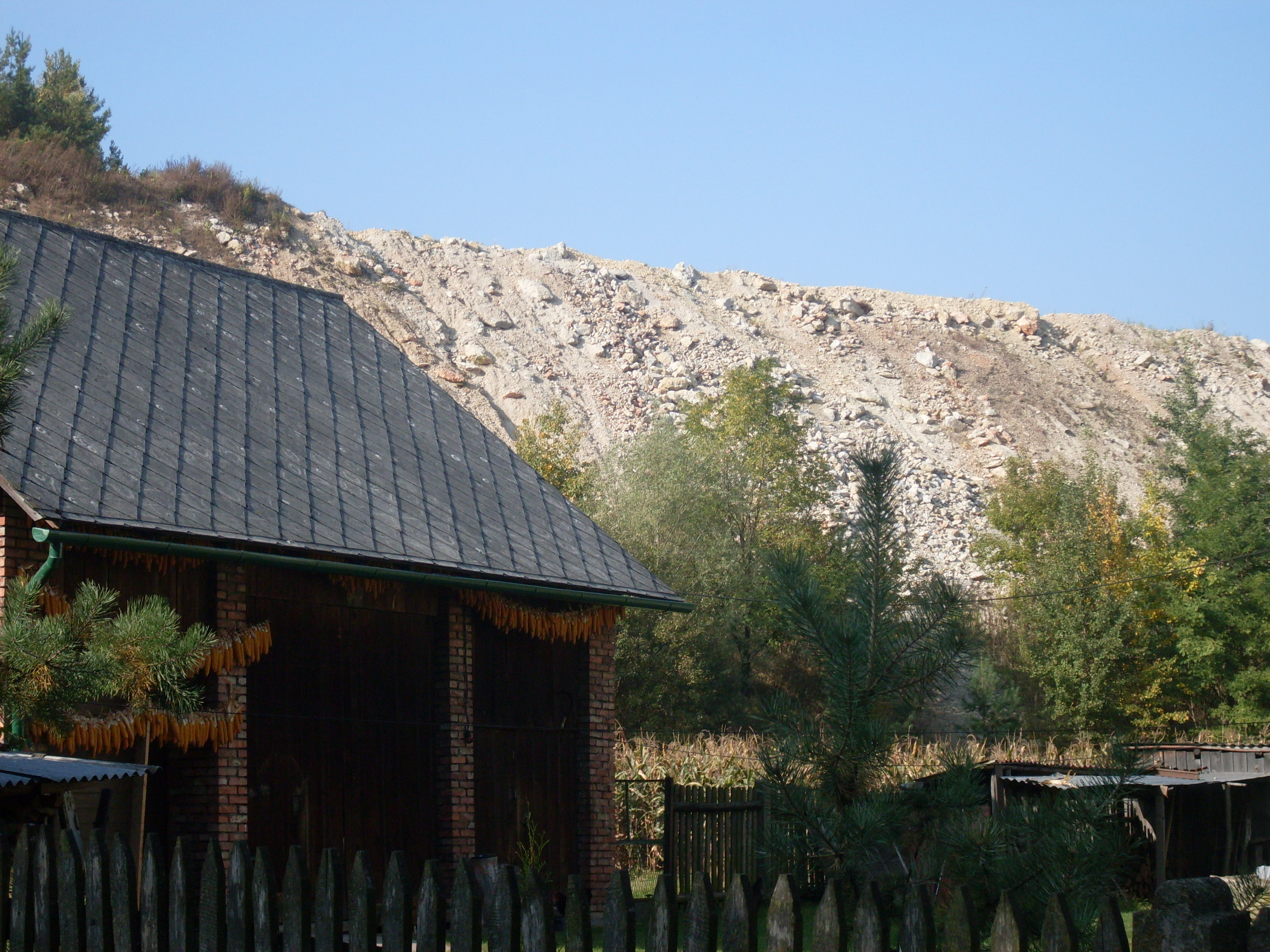 Frywałd -Wchodnia część kamieniołomu w Zalasie